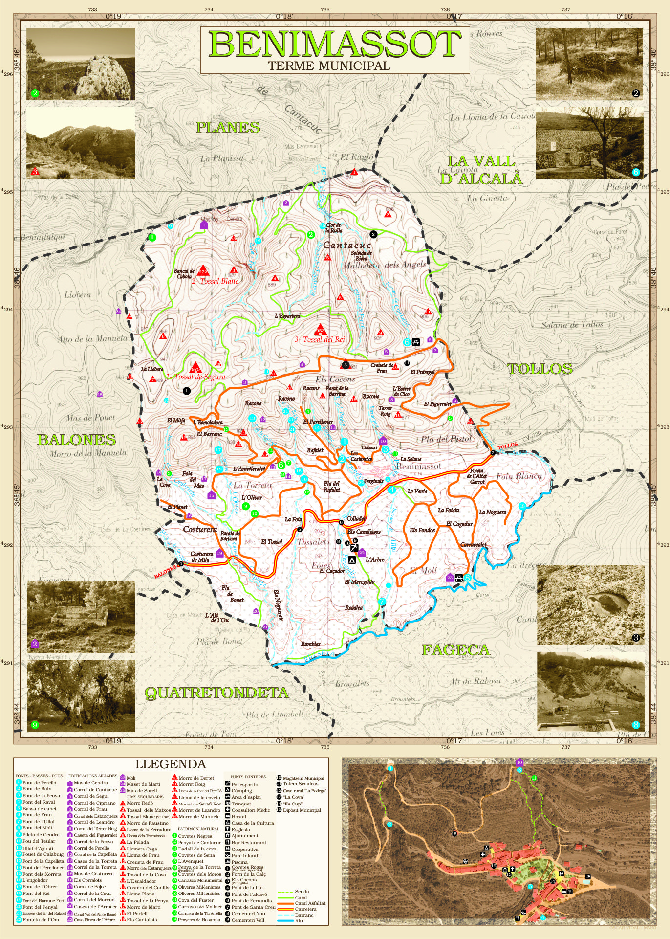 Mapa del terme de Benimassot amb indicacions dels punts d'interés principals.